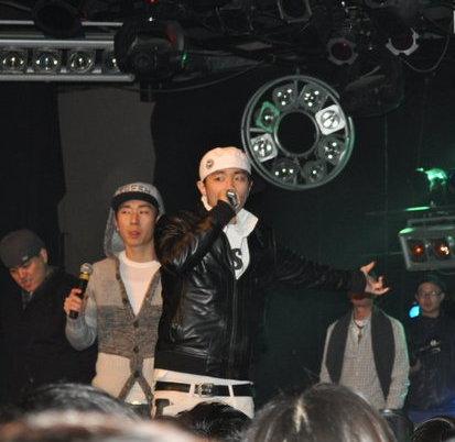 2010 소울컴퍼니 쇼에서 공연 중인 제이켠